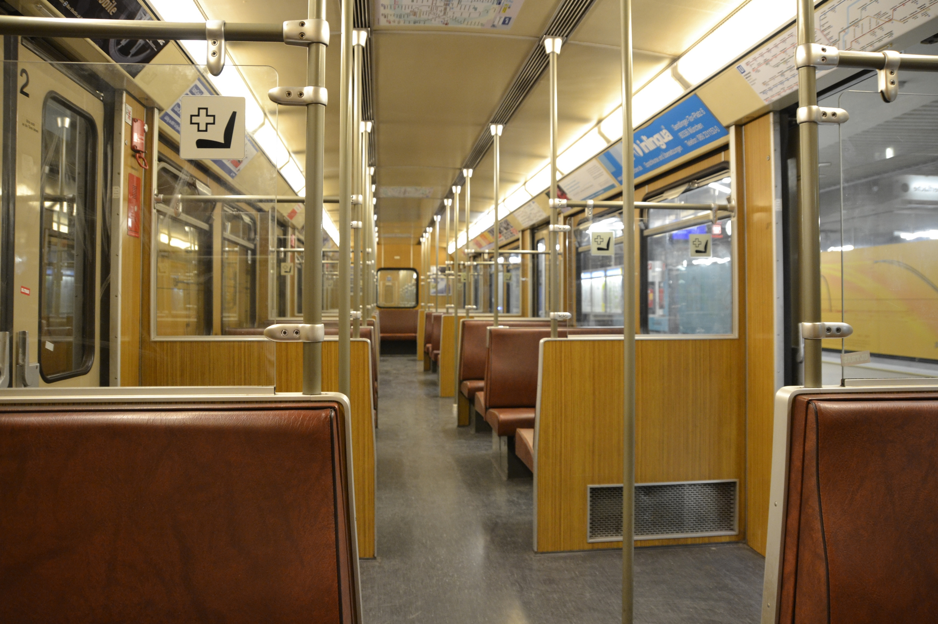 MVG B der Münchener U-Bahn von Innen.